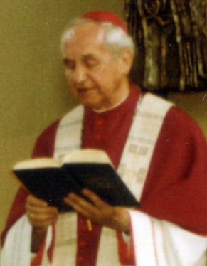 Anton Herre bei einer Taufe.